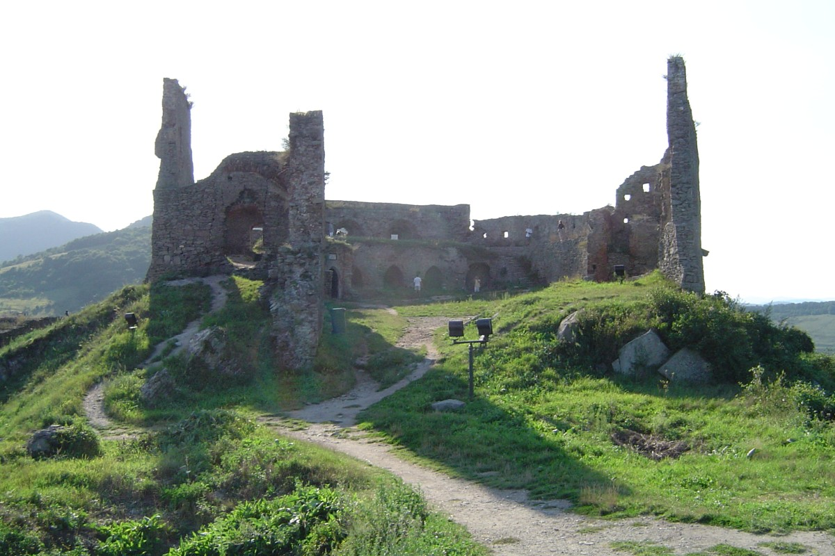 The Citadel in Deva